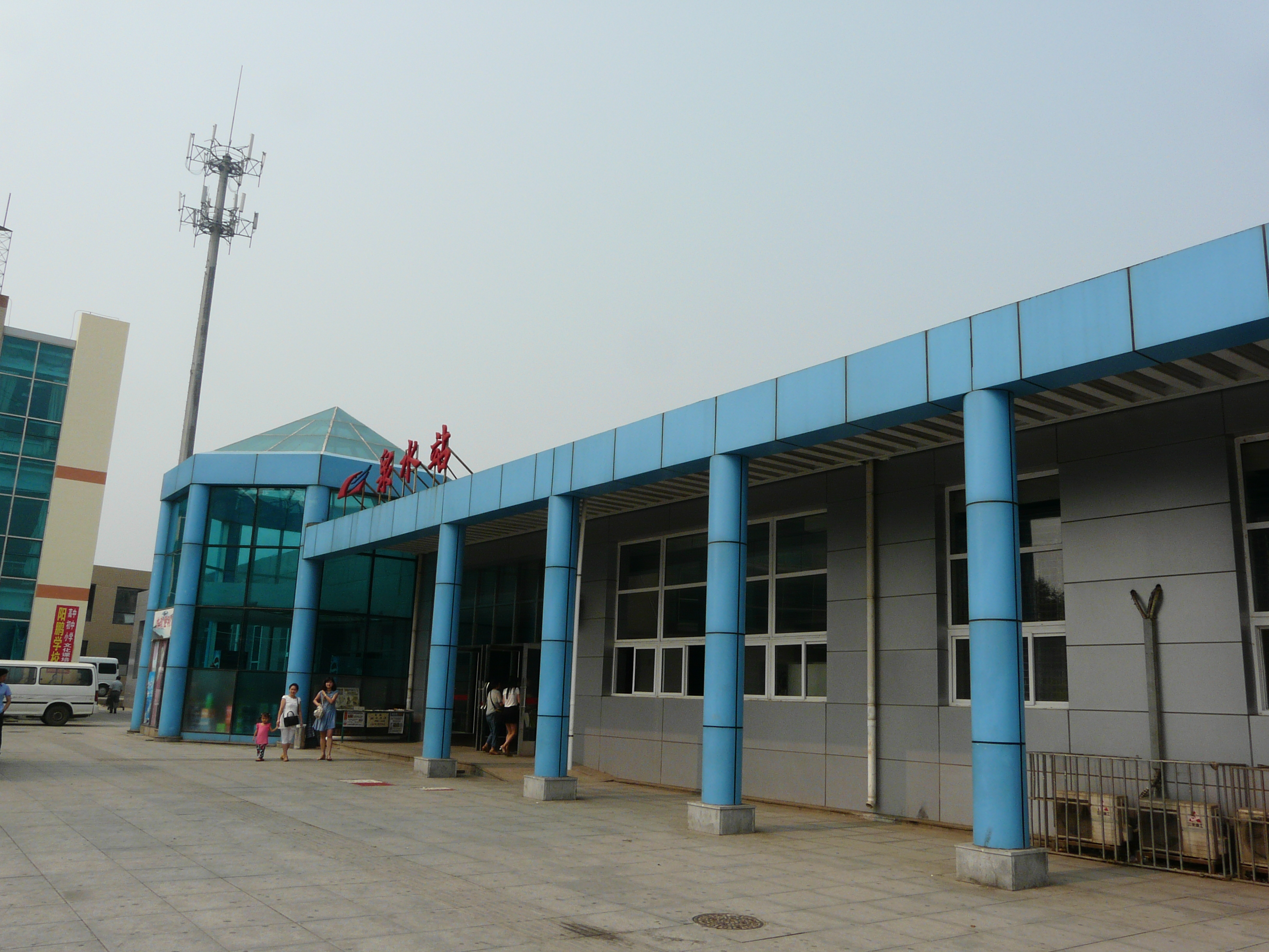 泉水站 (大连)